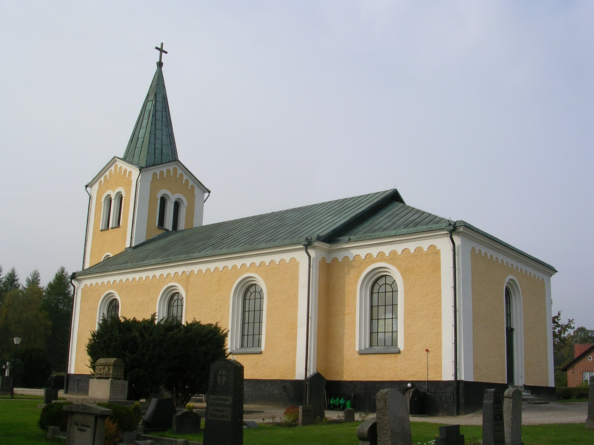 Tjörnarps kyrka Author: Väsk Date: October 2005